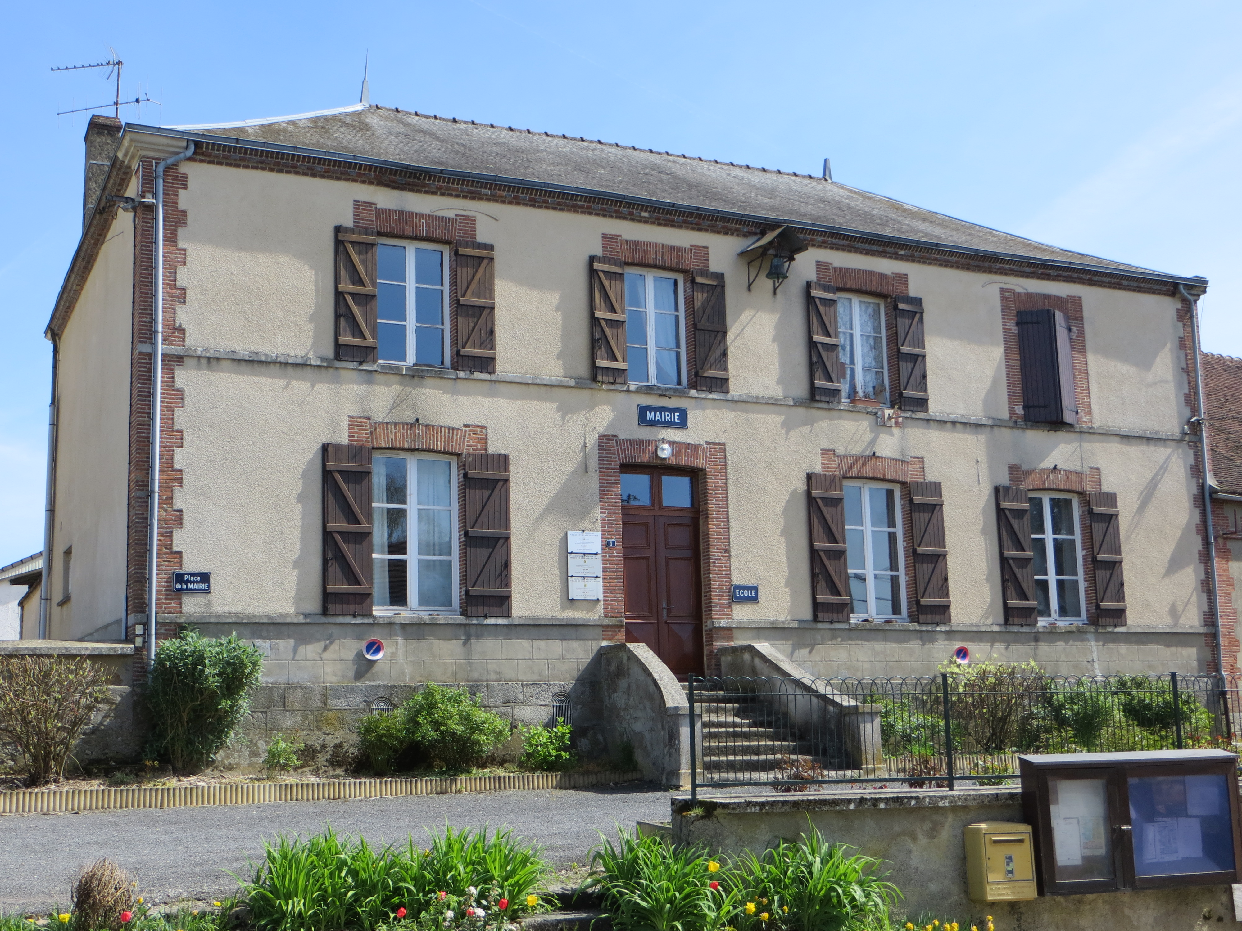 Mairie du bourg